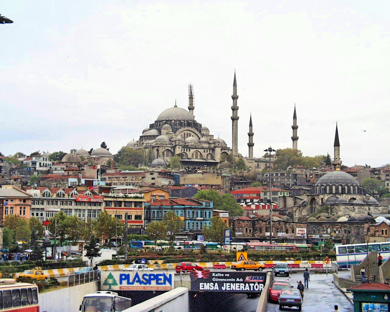 Istanbul 2000